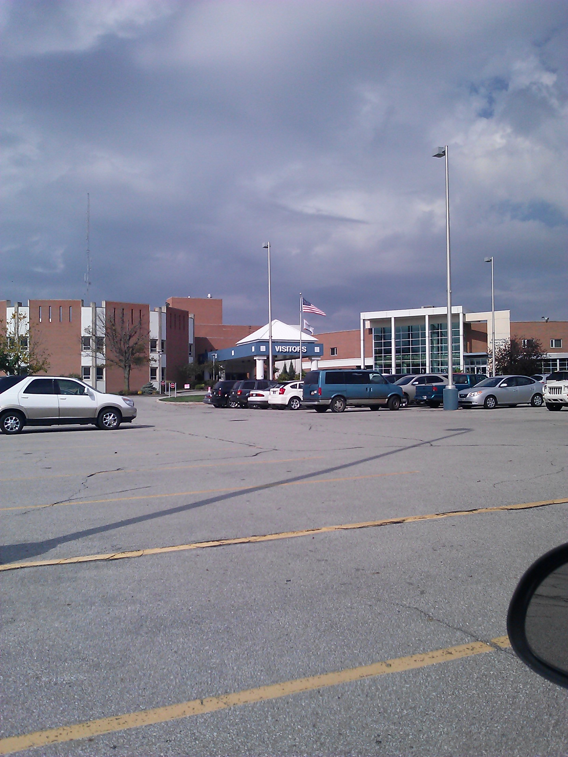 Kokomo Hospital